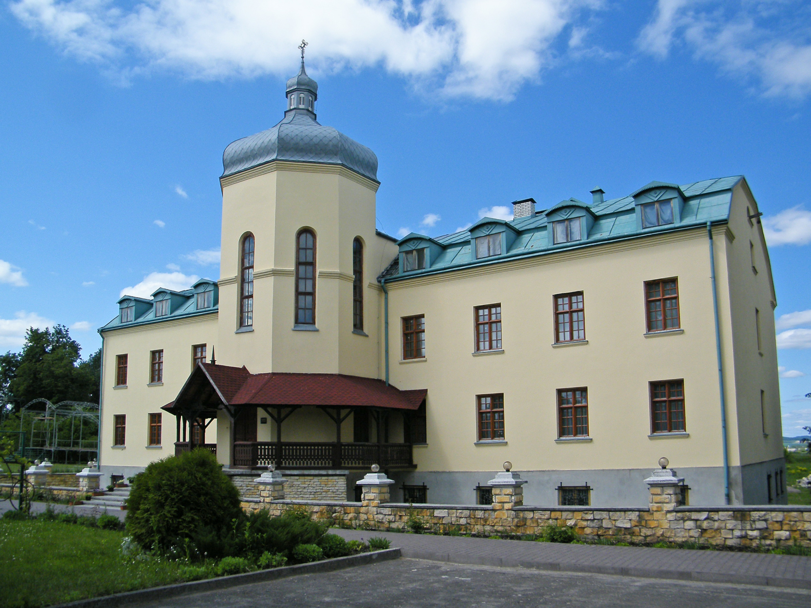 Василианский монастырь